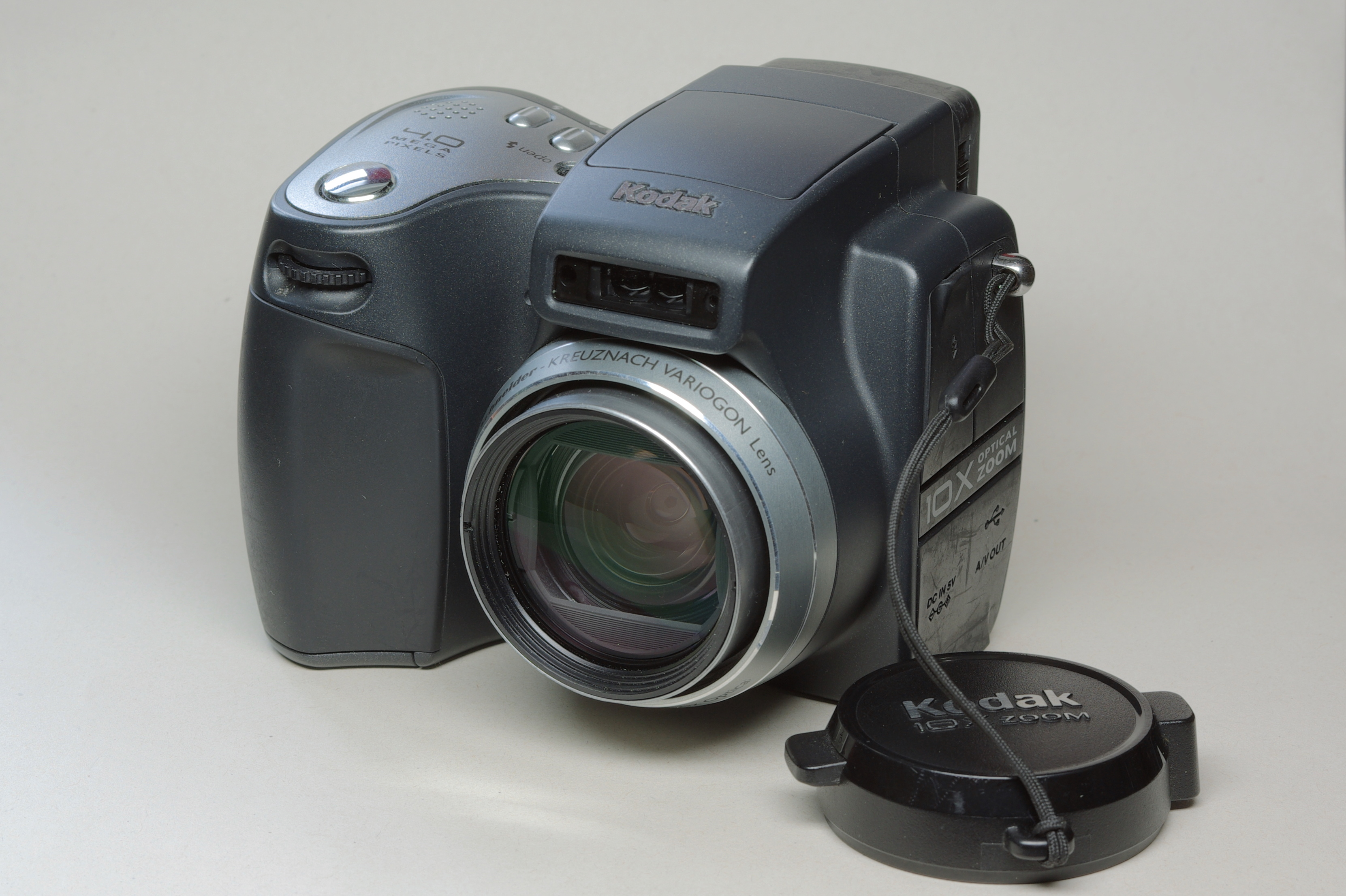 Kodak DX 6490 Digital Camera